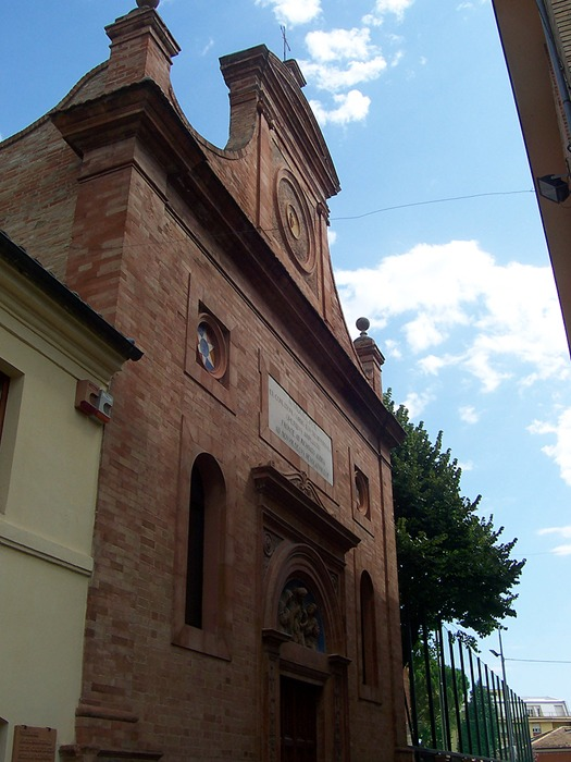 Tolentino - Chiesa del Sacro Cuore